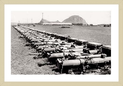 미군에 의해 폐기